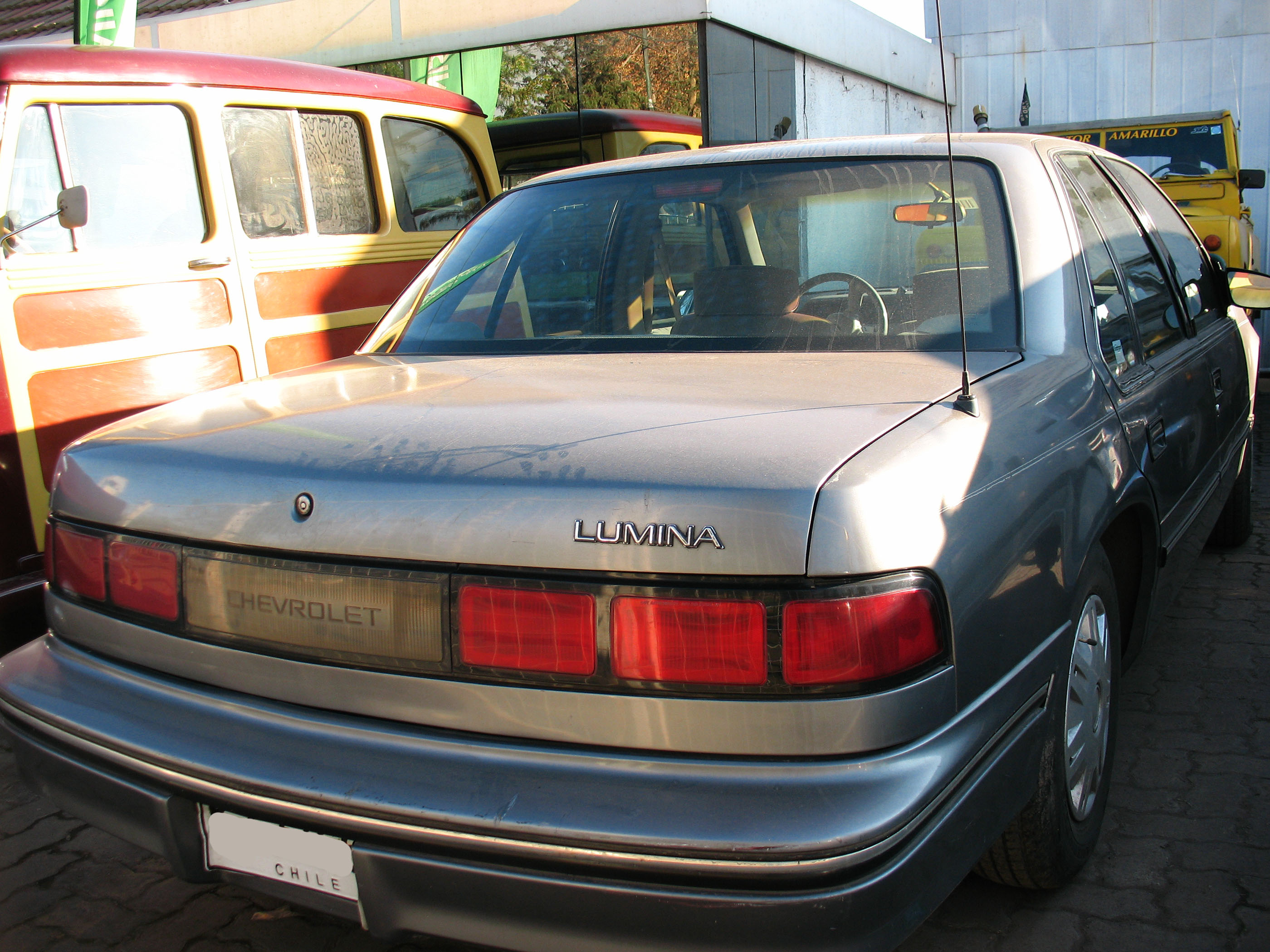 Chevrolet Lumina 3.1 1993